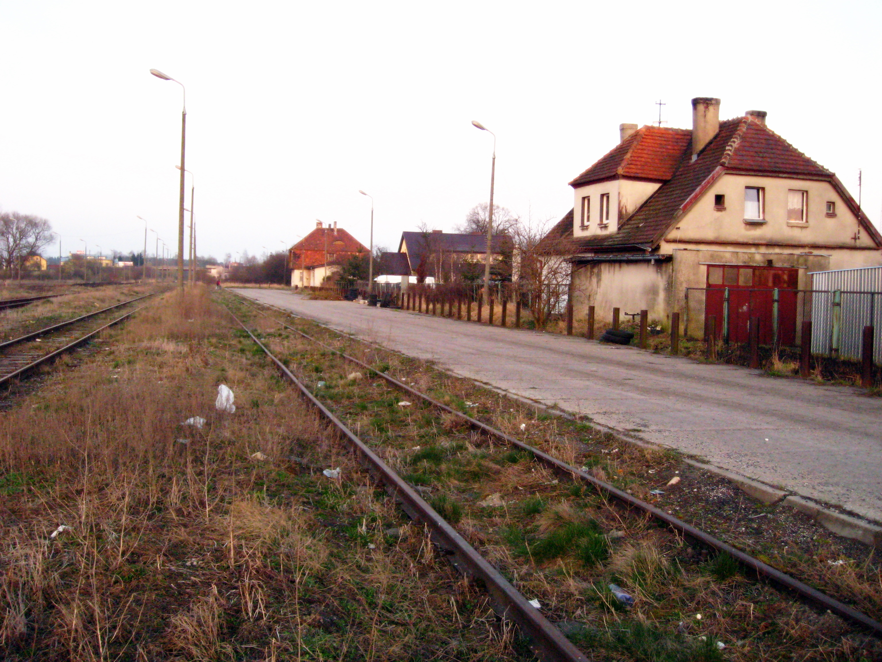 Stacja kolejowa Kokoszki (Gdańsk).